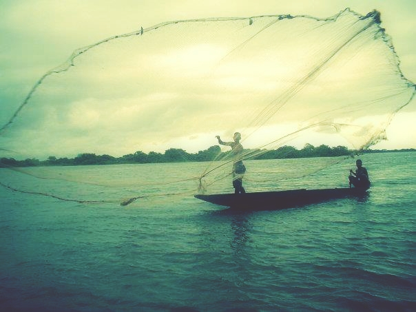 Pescadores En La Cienaga De La Zapatosa